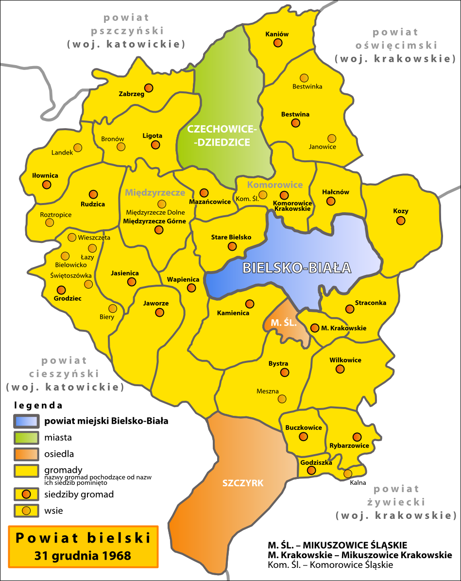 Podział administracyjny powiatu bielskiego – 31 grudnia 1968 roku.